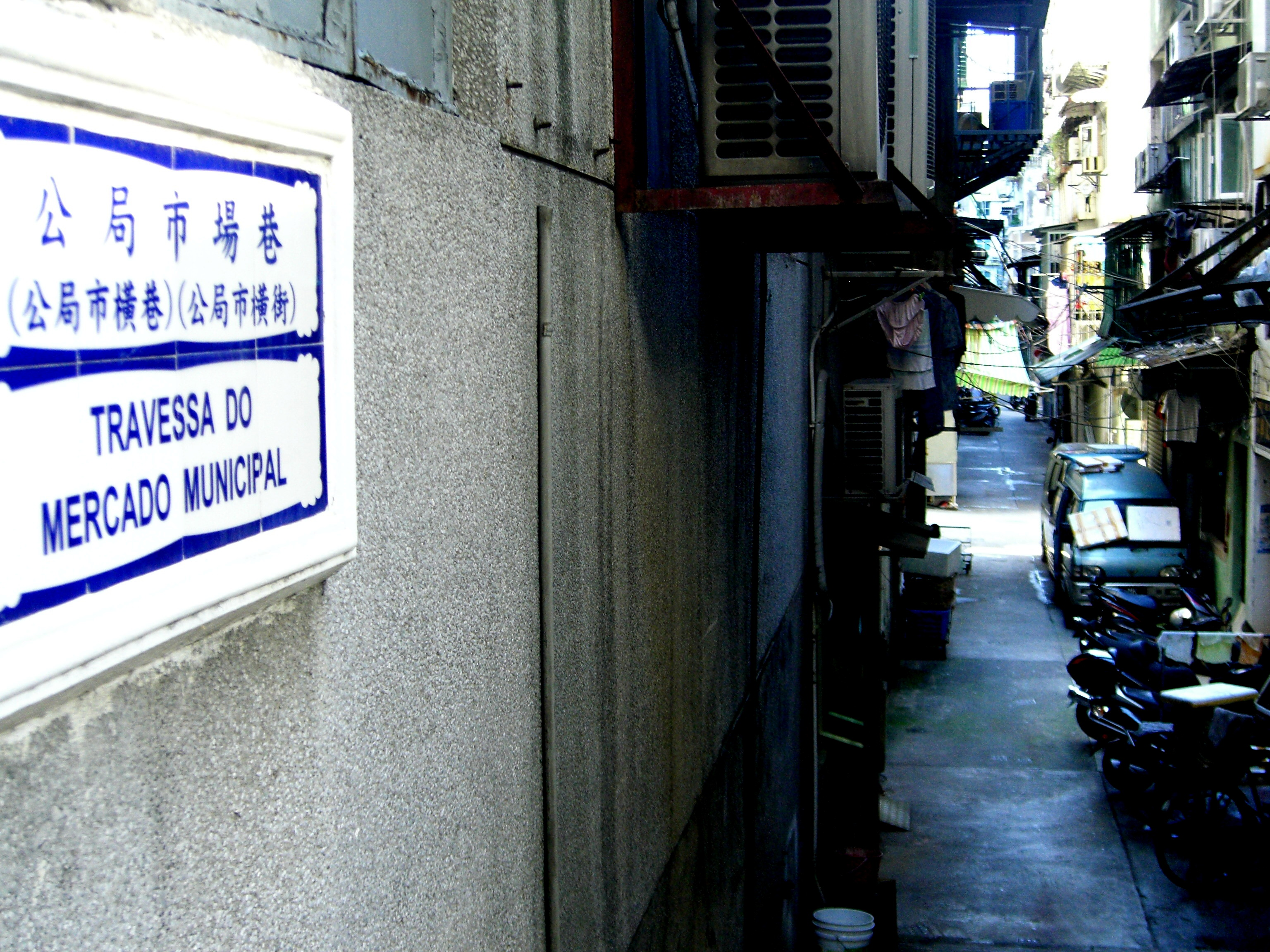 Travessa do Mercado Municipal